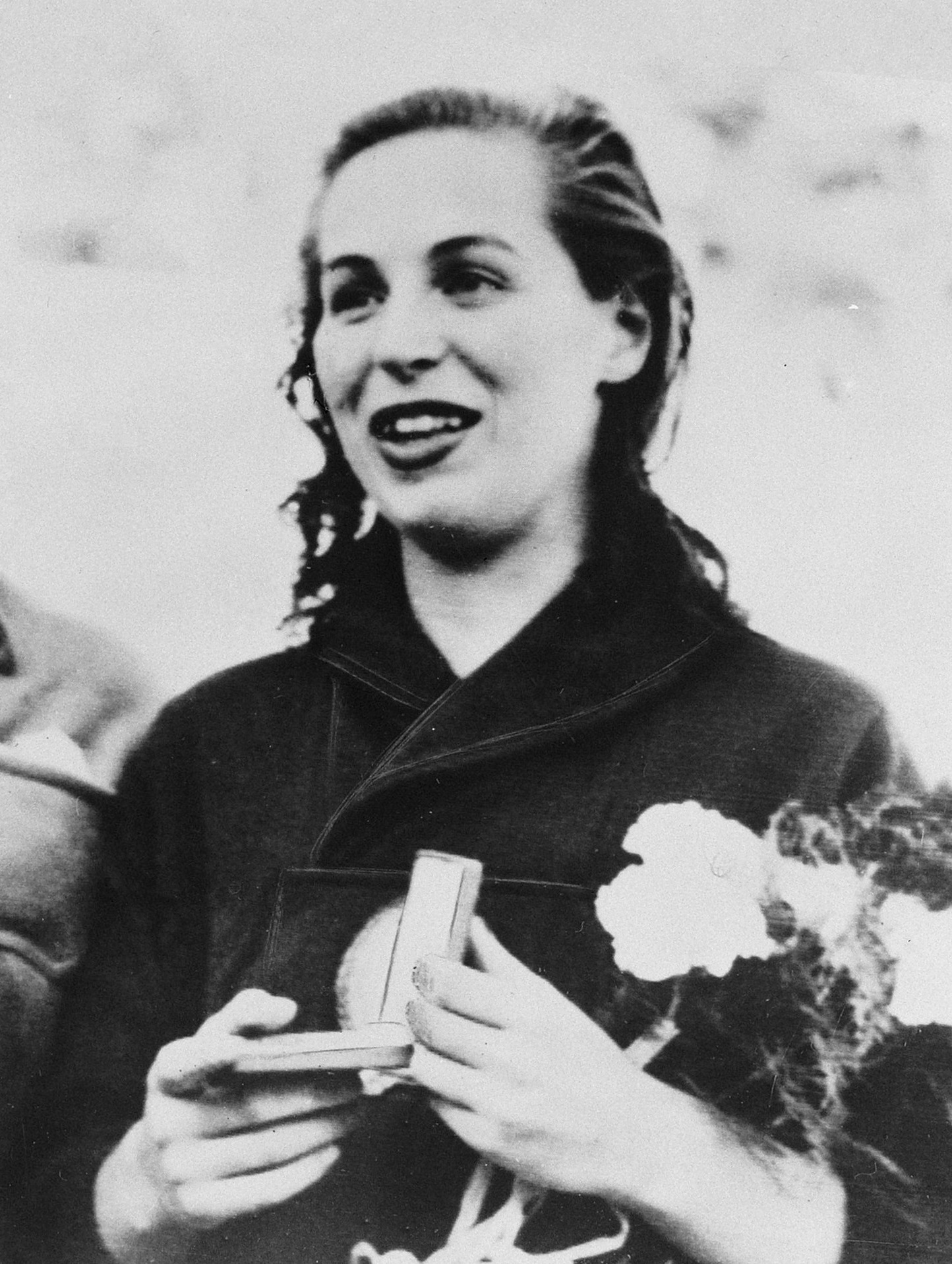 Katalin Szöke (Hongarije)